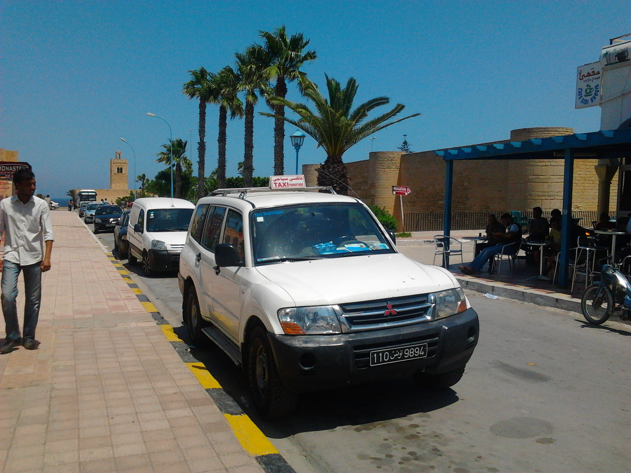 Taxi touristique (ou Grand taxi) (Obligatoirement blanche) - Monastir